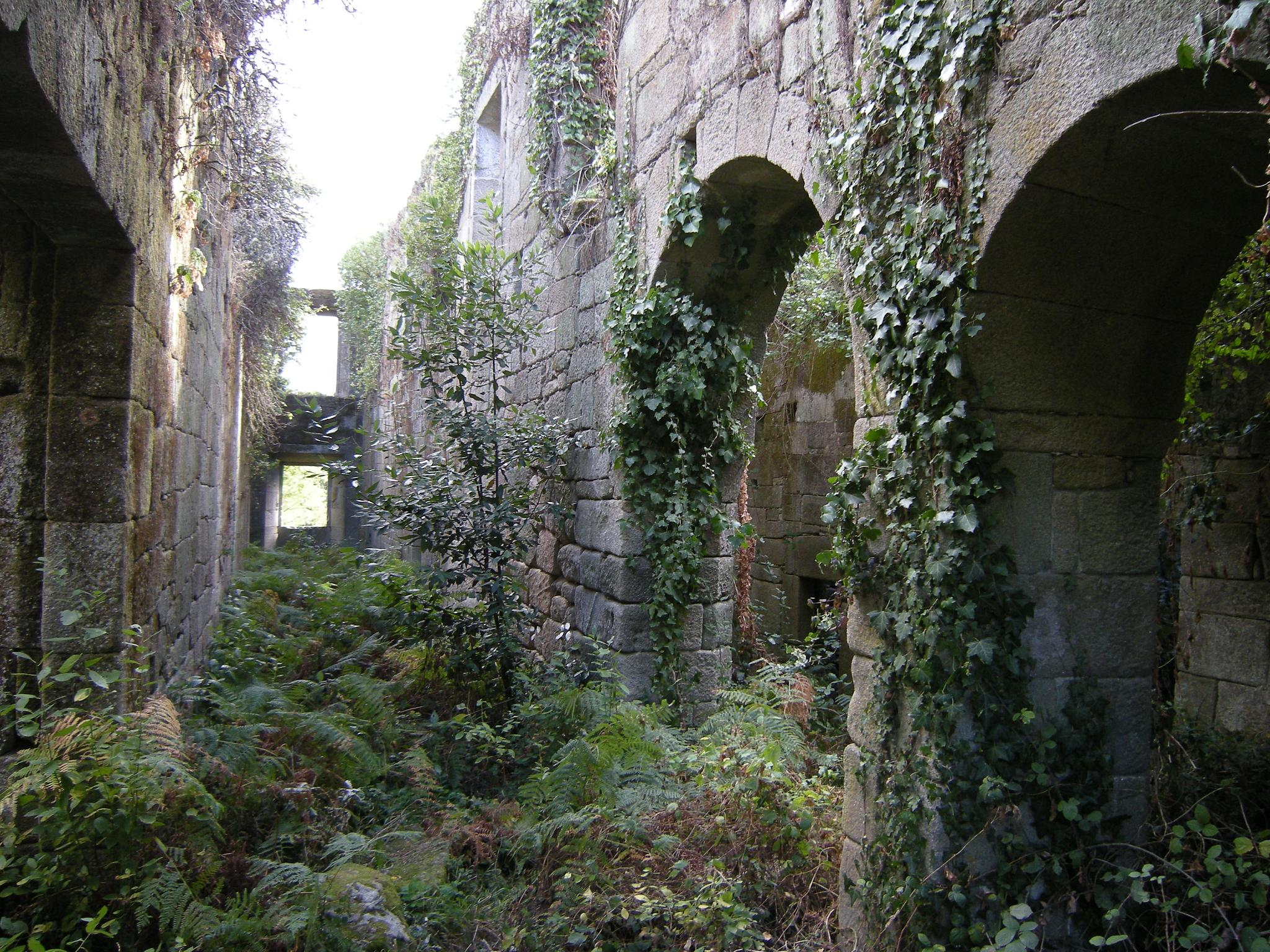 Monasterio de Santa Comba de Naves - Ourense